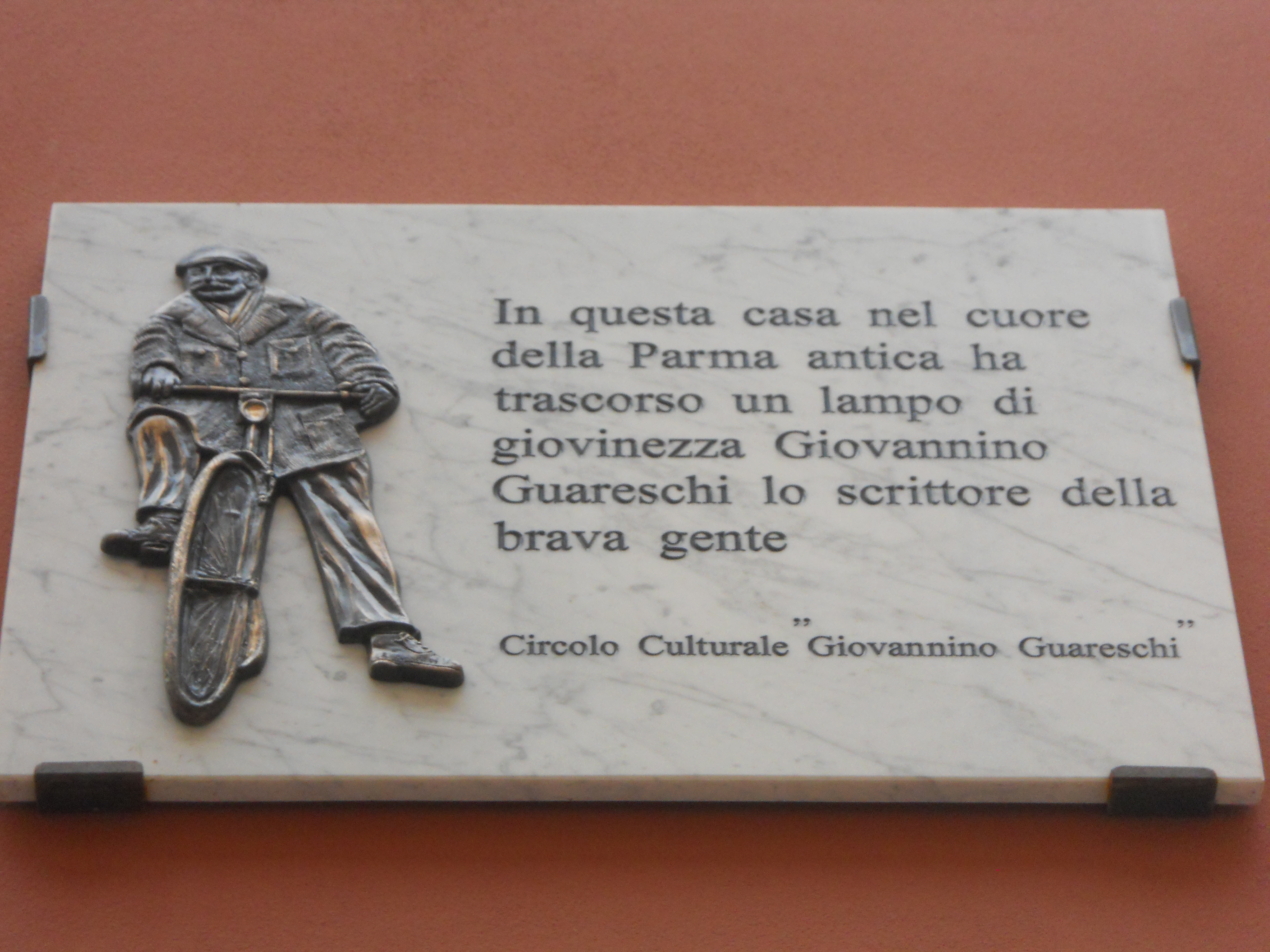 Targa ricordo nel entro di Parma